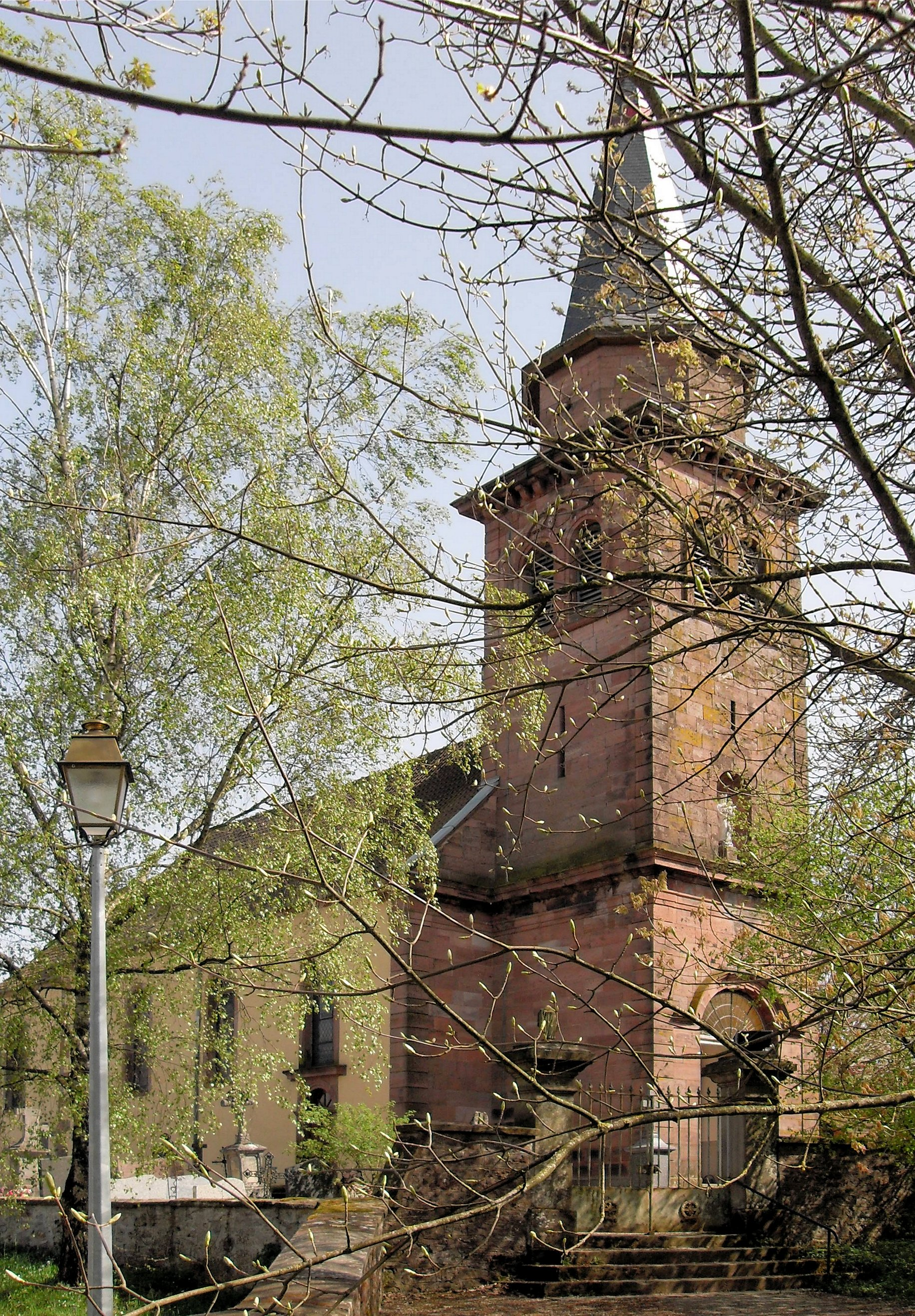 L'église Saint-Antoine à Vauthiermont